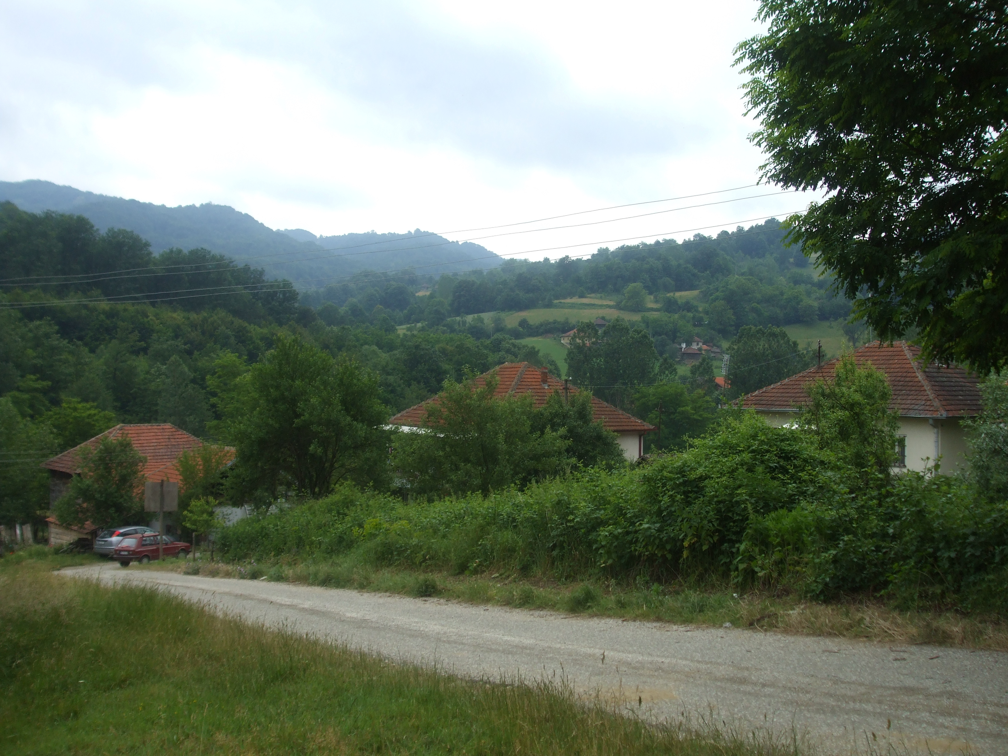 Центар села, поглед ка западу са пута изнад амбуланте. Снимио Драгољуб.